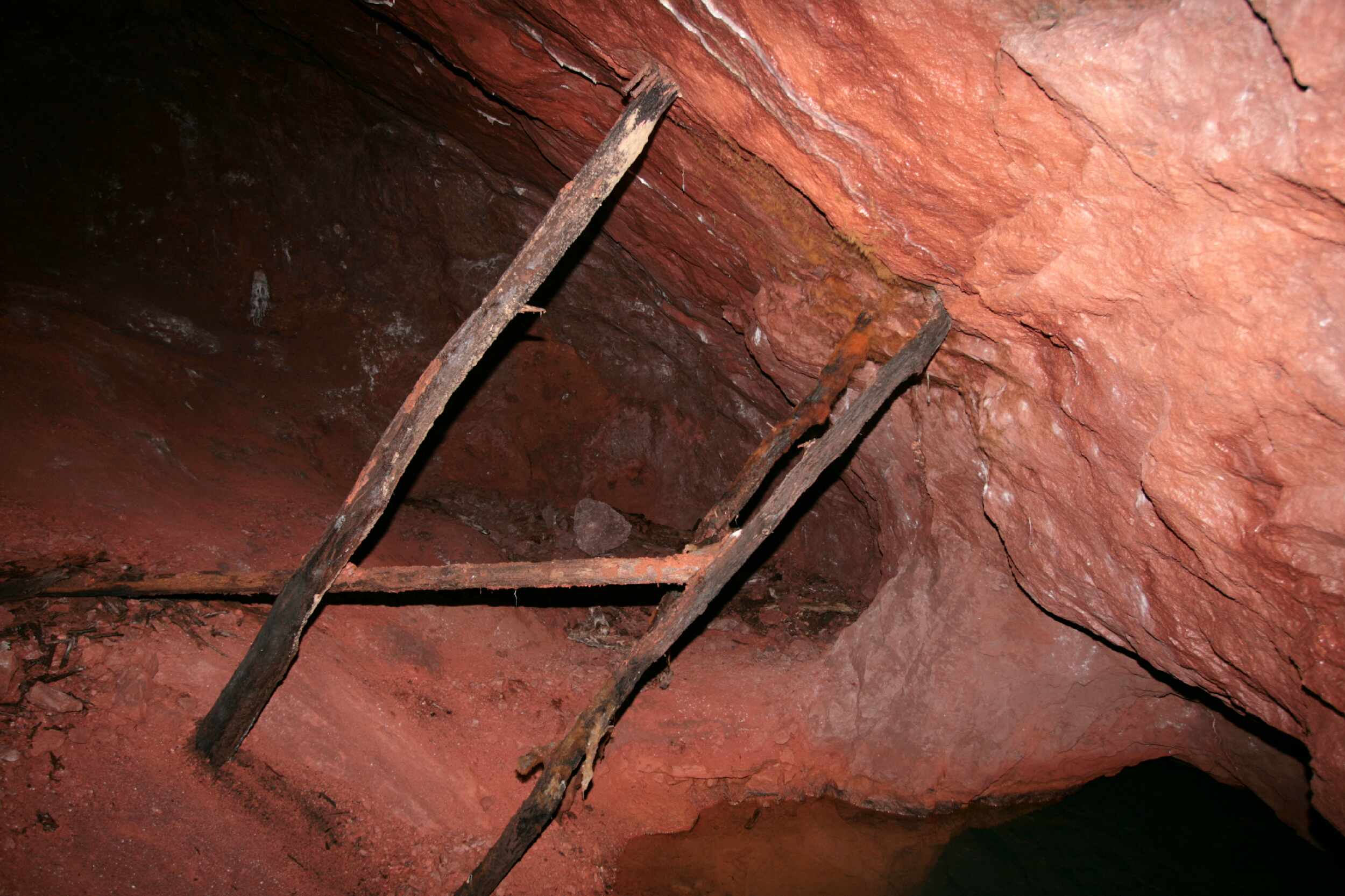 Beschreibung: Stammtisch Sauerland im Phillipstollen Olsberg, Quelle: Eigenes Foto Urheber: Wolfgang Poguntke Aufnahmedatum : 12.07.2008